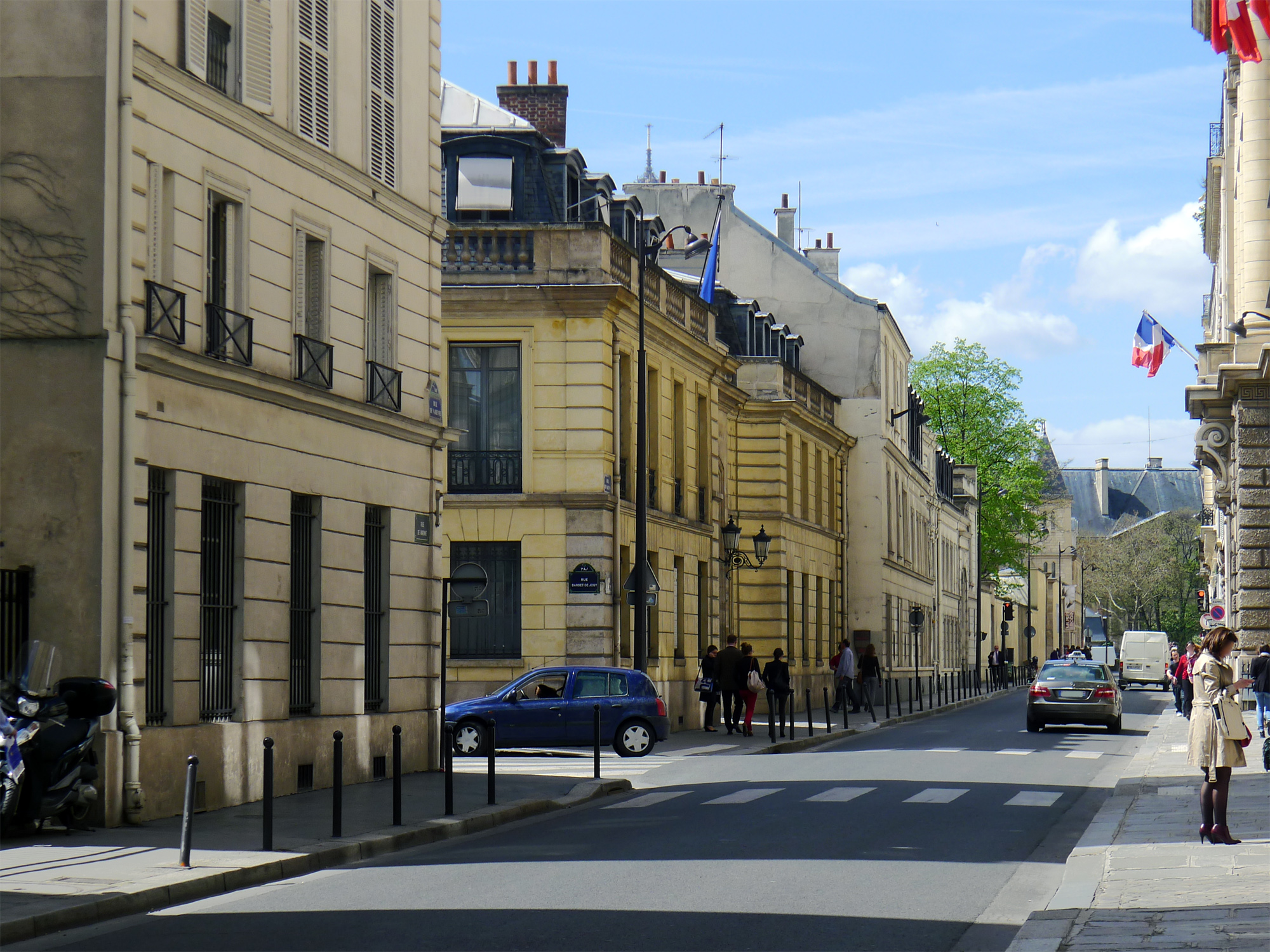 Rue de Varenne - Paris VII